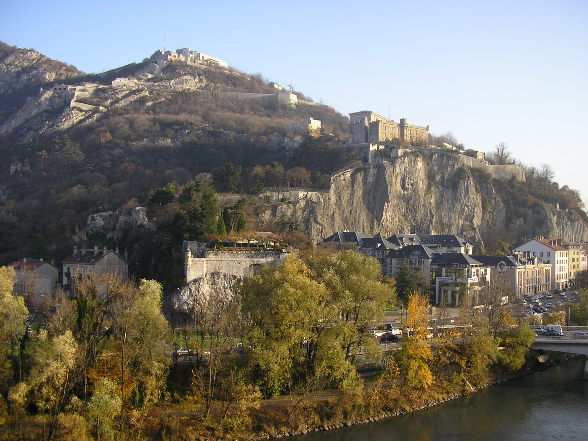 Vue de la Bastille depuis le centre ville de Grenoble